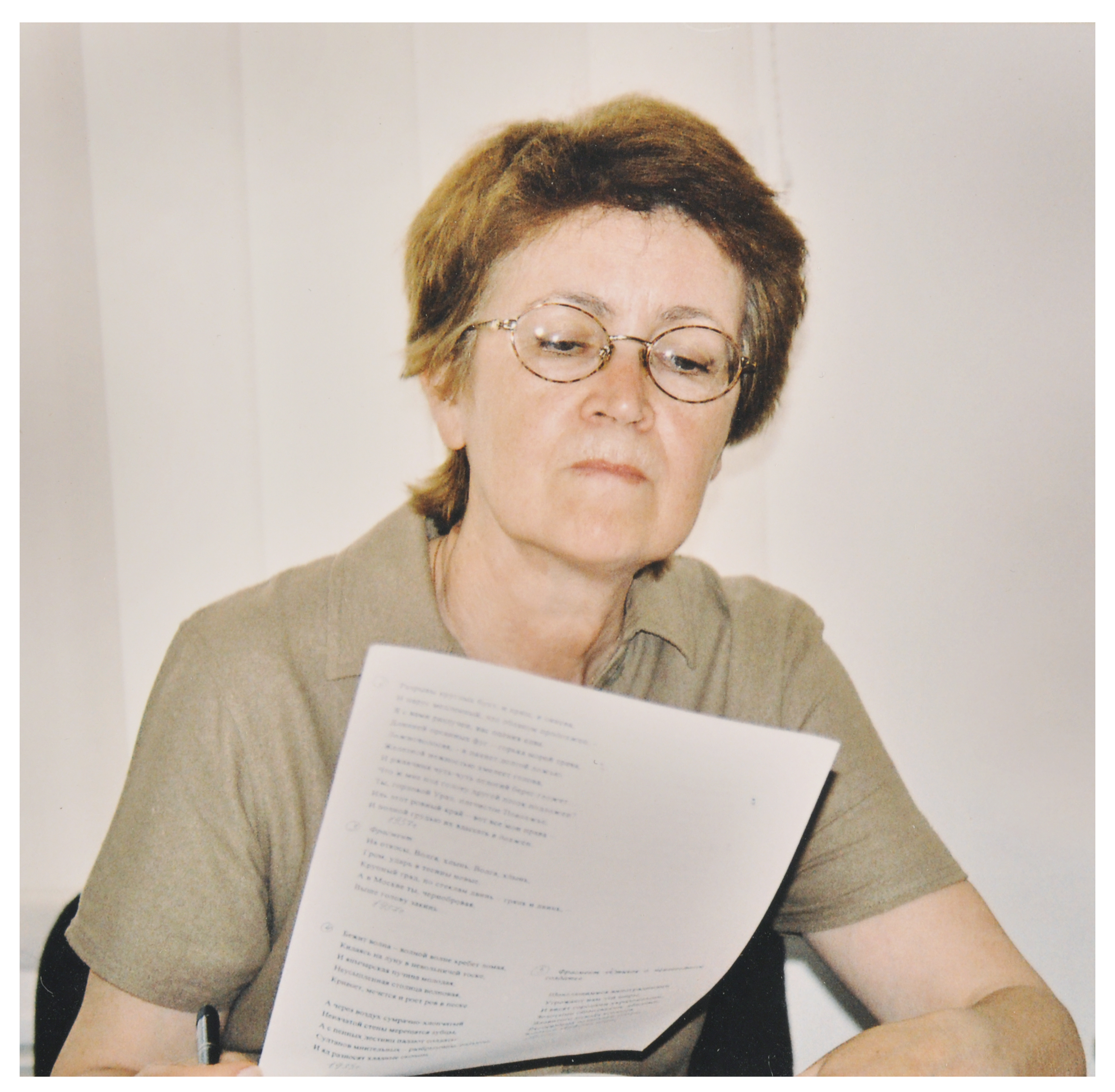 Елеонора Соловей (літературознавець)